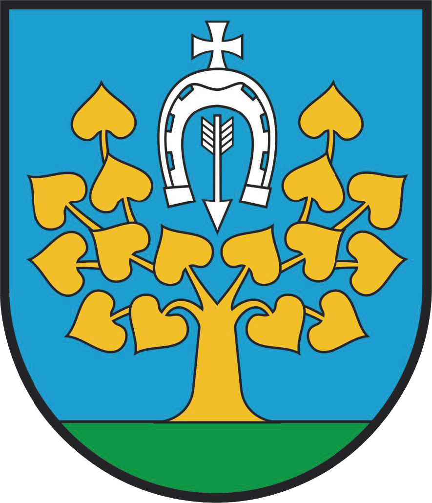 Herb gminy Lipno w województwie kujawsko-pomorskim